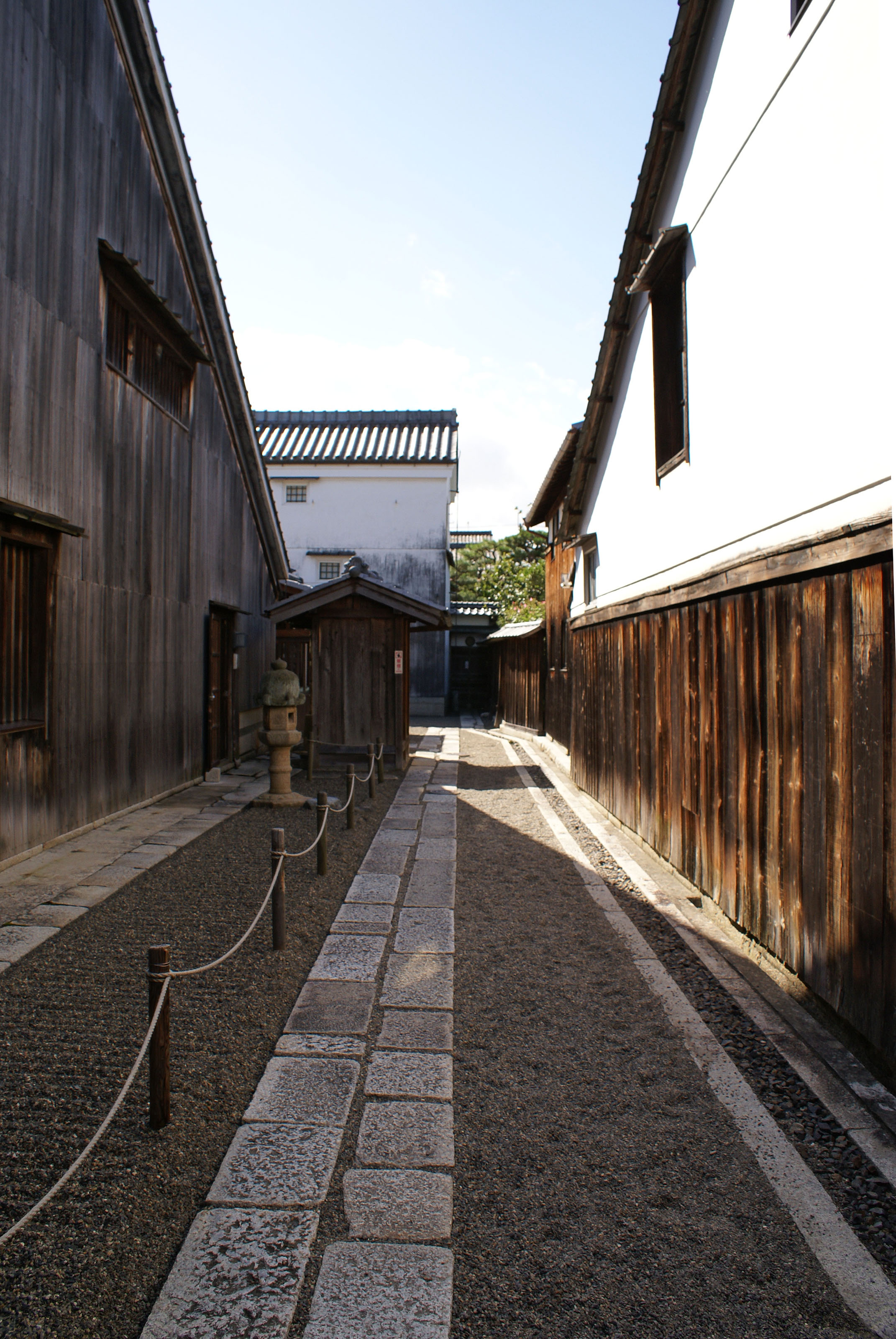 Old Nishikawa house in Omihachiman, Shiga, Japan